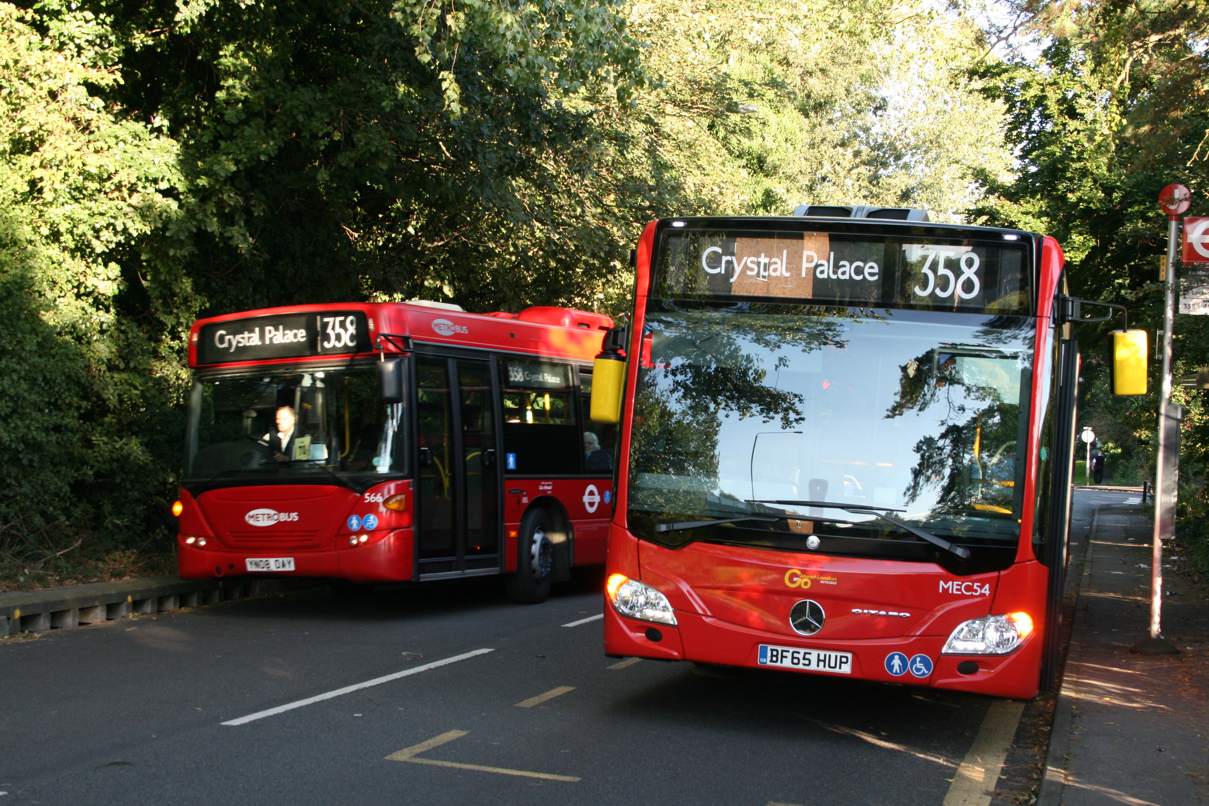 566 - YN08 OAY MEC54 - BF65 HUP